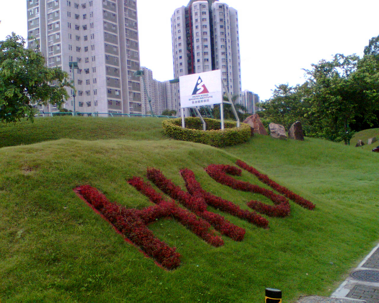 香港體育學院